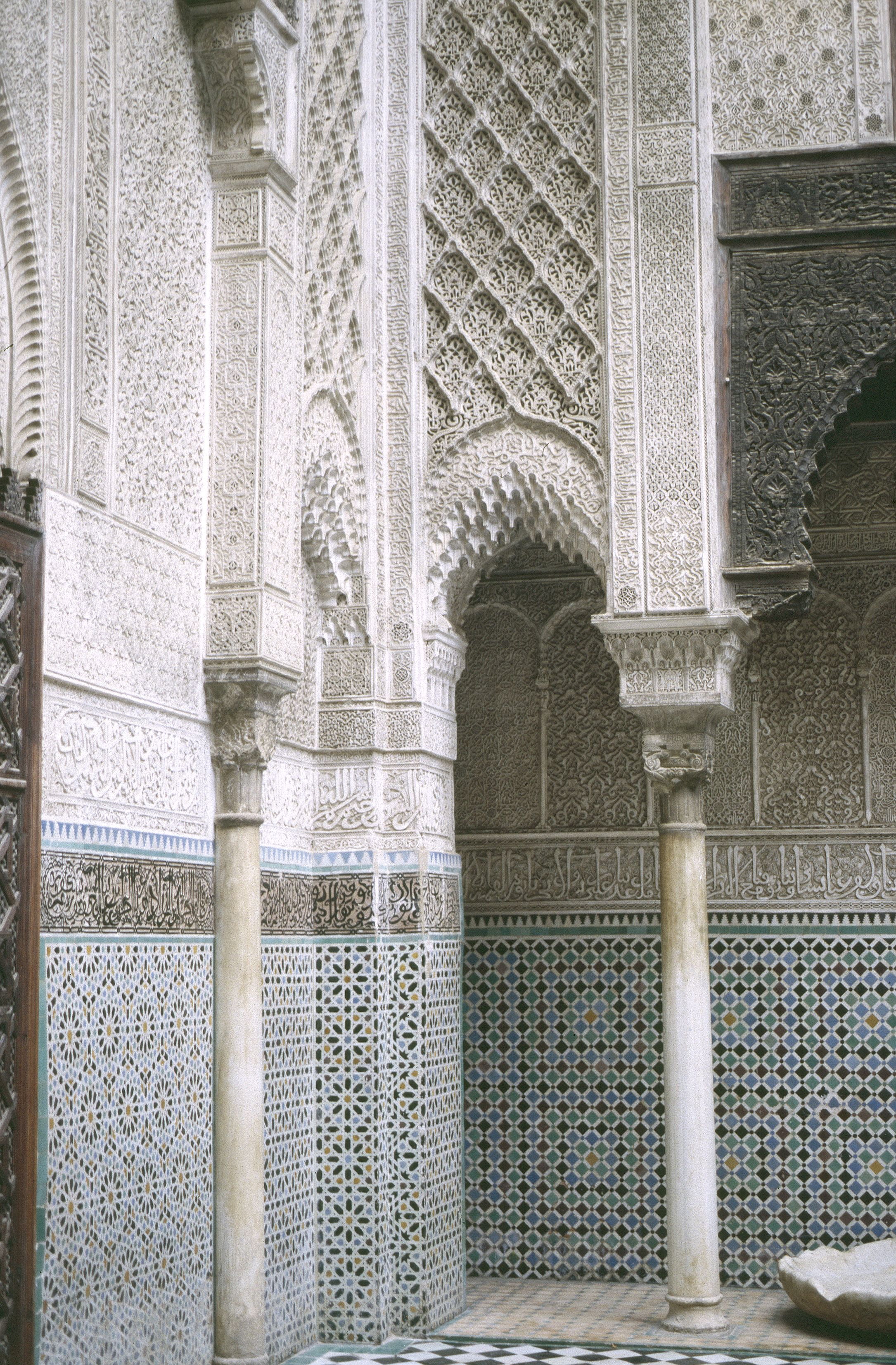 Fes: Medersa es-Attarine